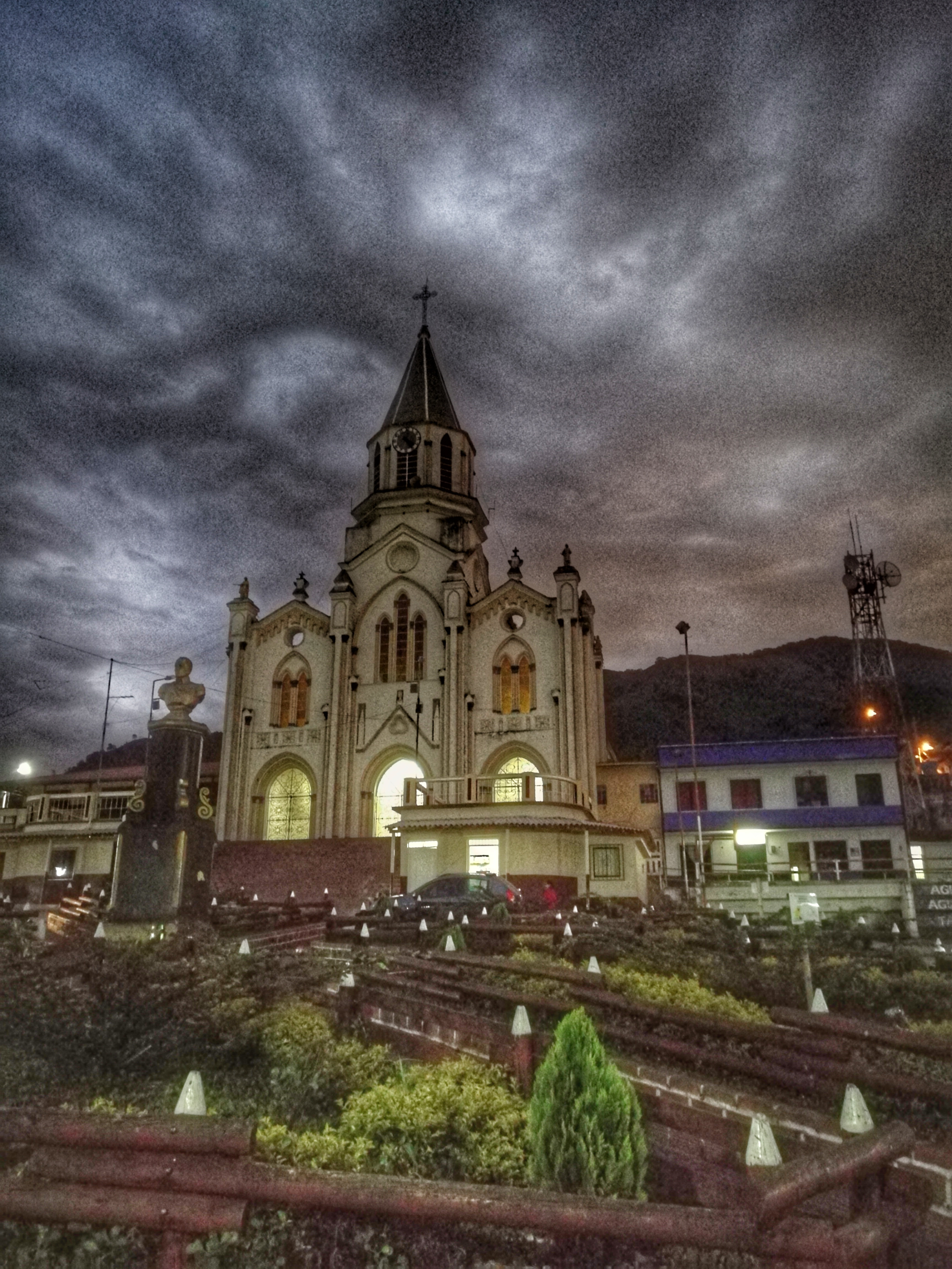 Una fotografía capturada desde el Parque Principal de El Carmen de Atrato, Chocó a las 5:30 AM